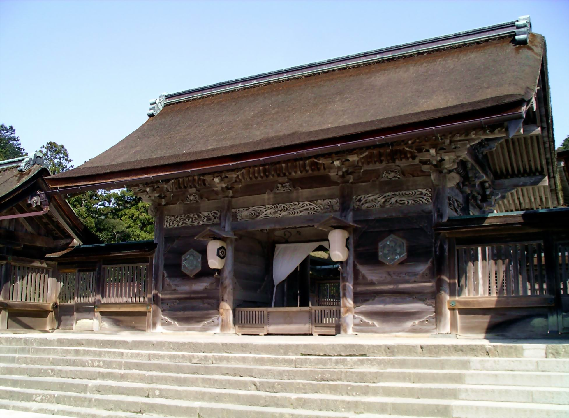 Izumo Taisha, Shimane.